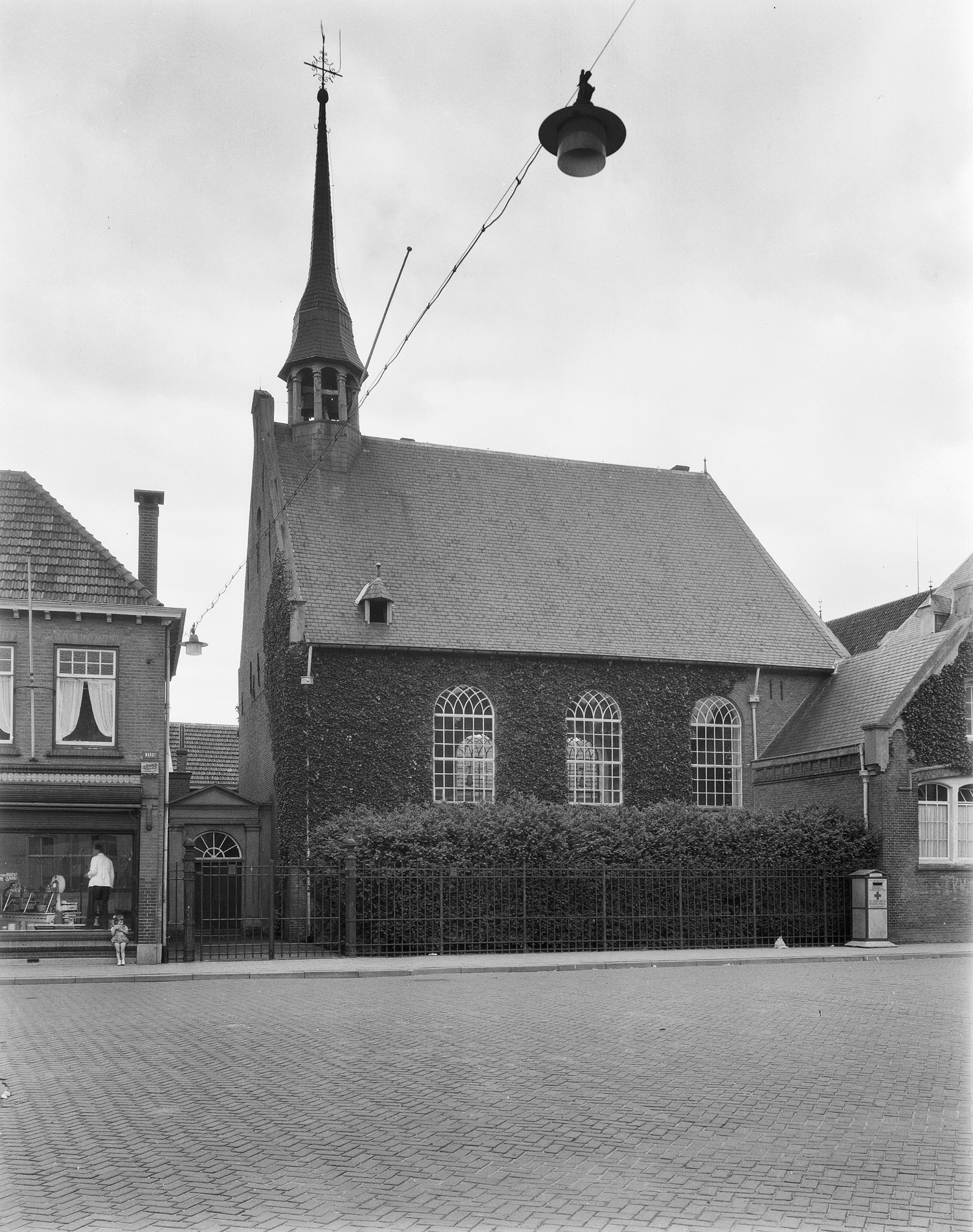 Nederlands Hervormde Kerk: exterieur naar het noorden